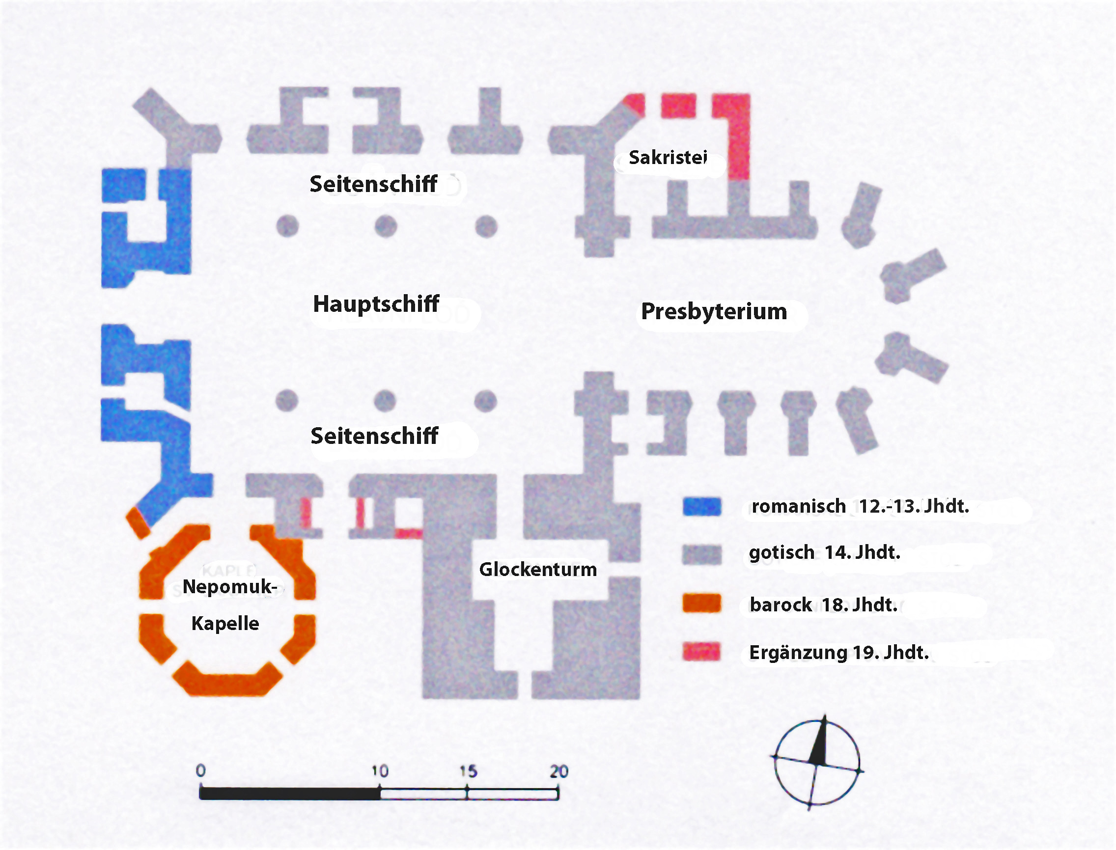 Grundriss der Dekanatskirche Mariä Himmelfahrt in Saaz/Žatec